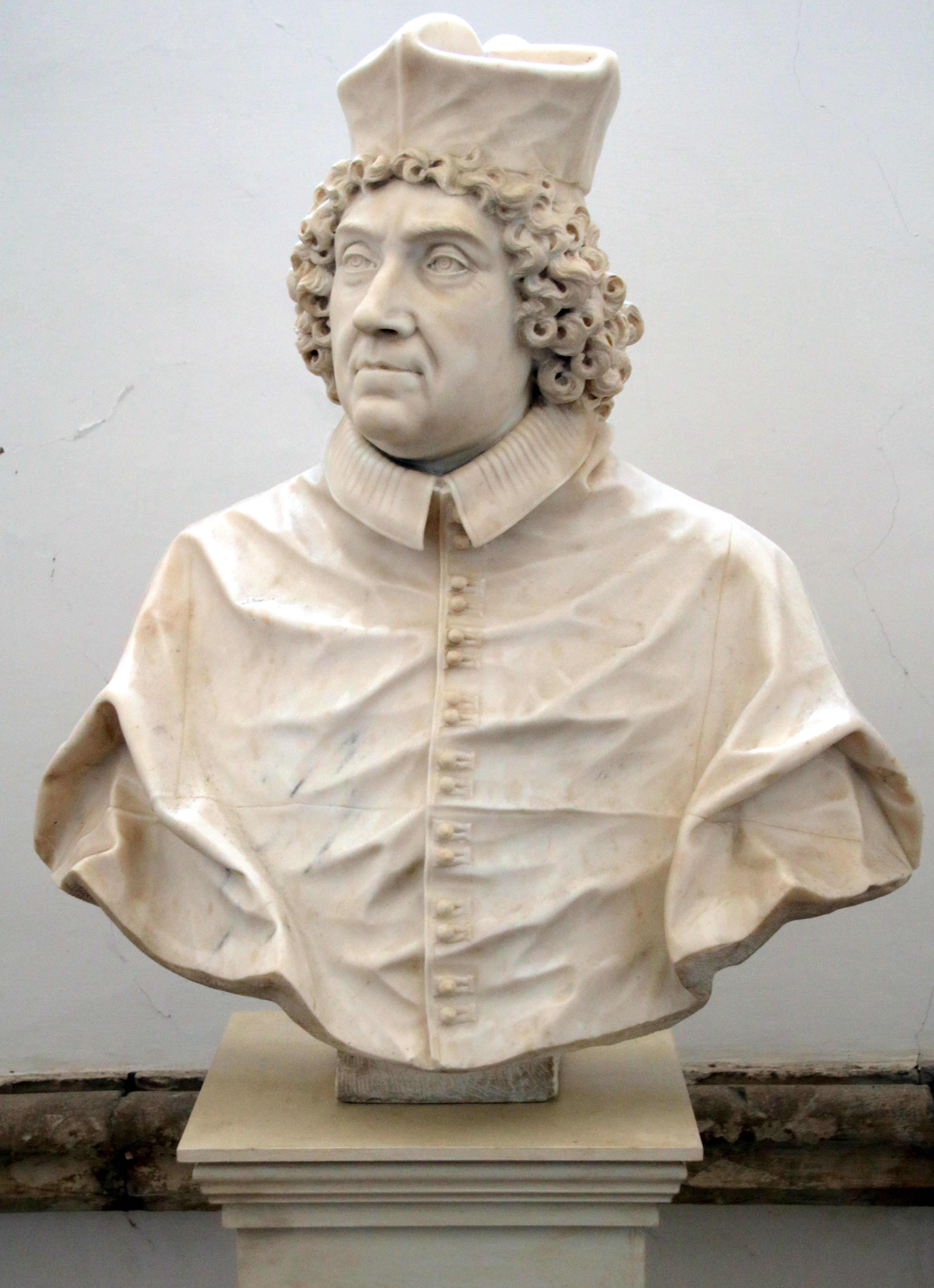 Galleria nazionale delle Marche This is a photo of a monument which is part of cultural heritage of Italy.